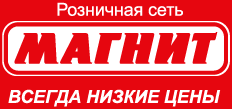 логотип сети Магнит